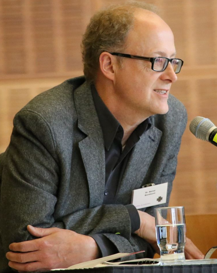 2. Frankfurter Hilfe-Konferenz, 20.-22.2.2014. Bernd Bornhorst